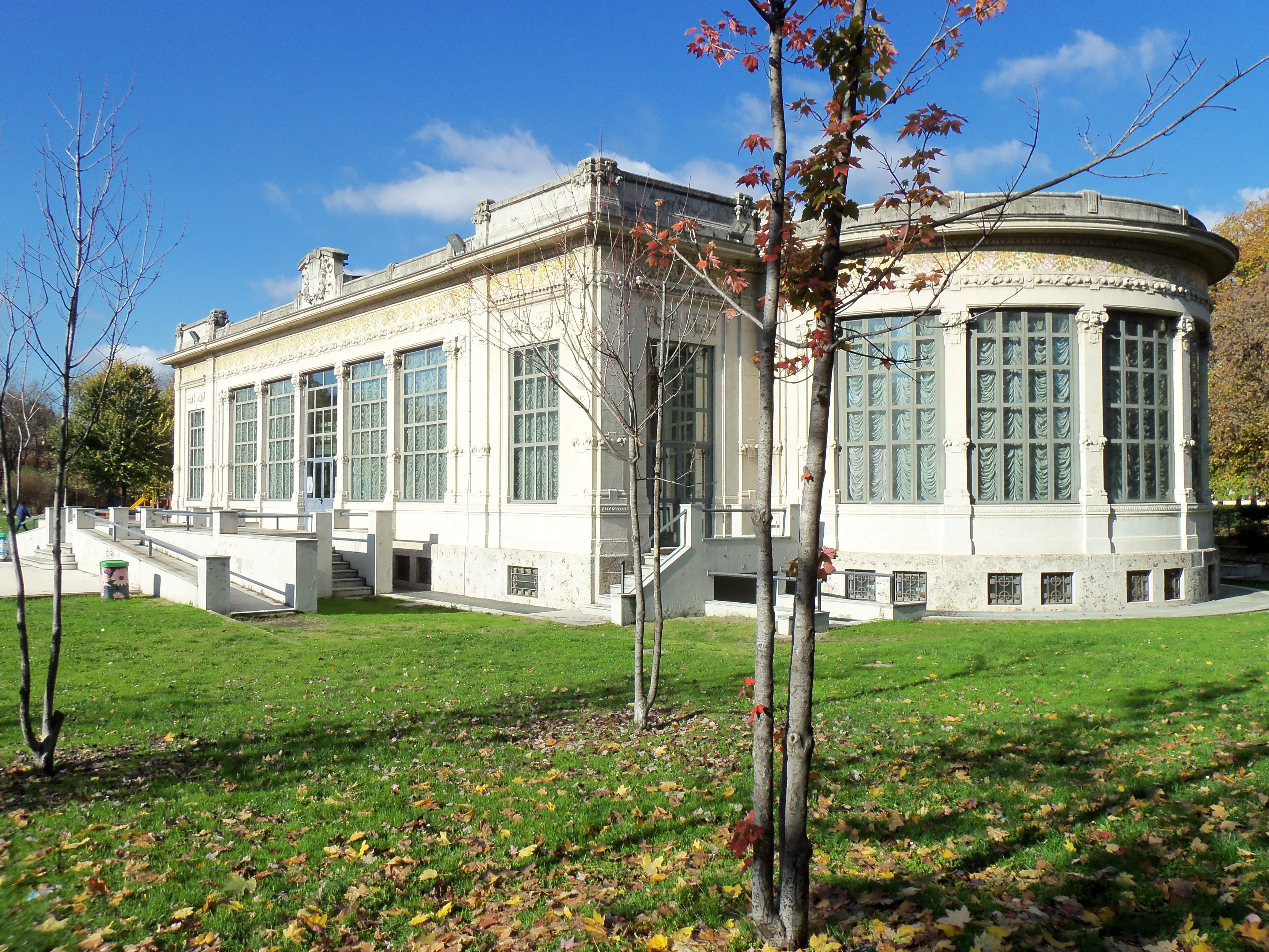 Milano, la Palazzina Liberty all'interno del parco Formentano.